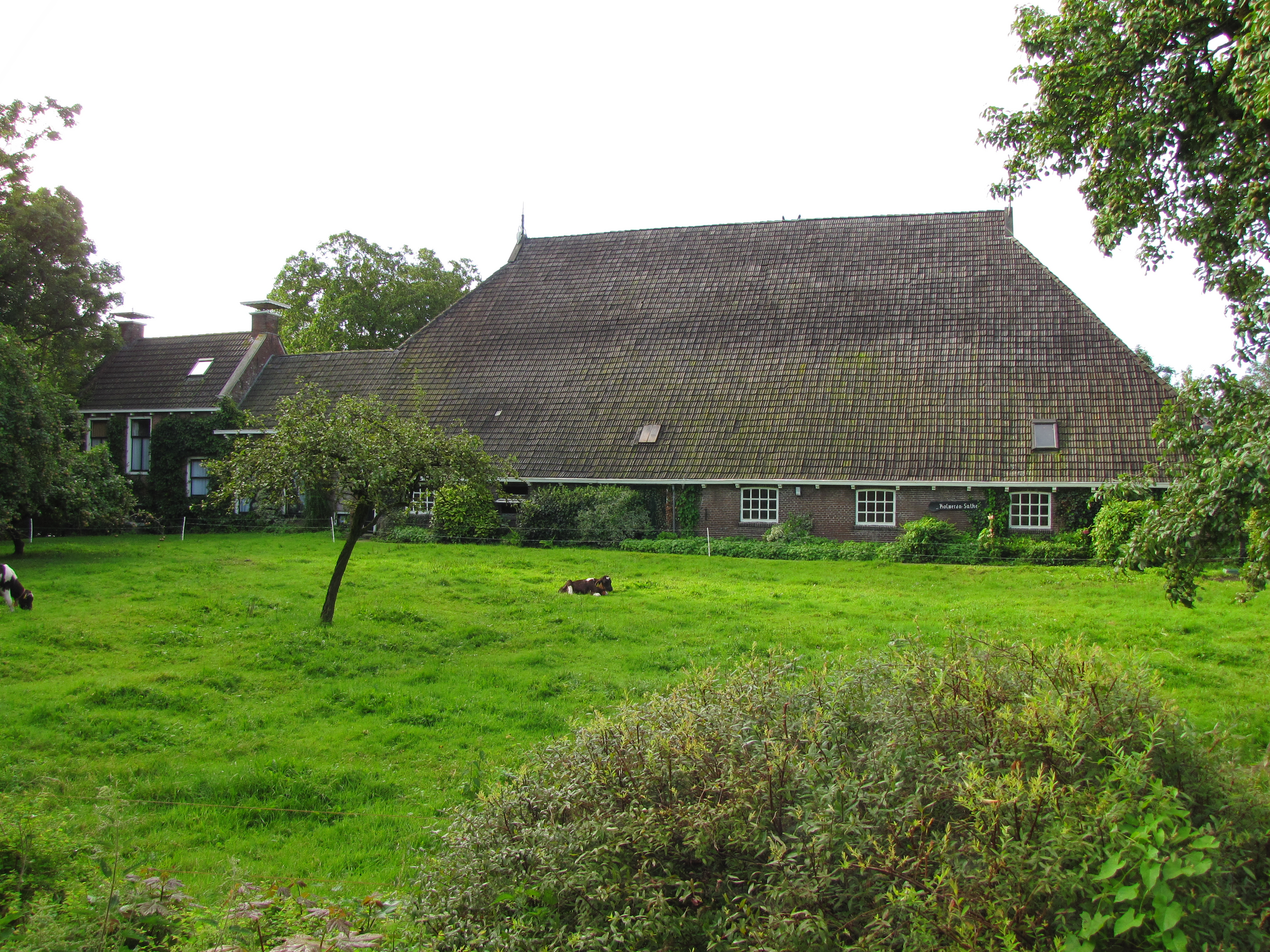 In de 15de eeuw vererfde Helvardera state op de bewoners van het naburige goed Aytta state. Doordat Jarich Jelckema trouwde met Sjouck Aytta kwam de state in de familie Jelckema. Later vererfde het goed op Abbema's en Douma's en ten slotte kwam het aan Sids Botnia. De beroemde en rijk geworden Viglius van Aytta kocht veel van de vroegere Aytta goederen op, waaronder Helvardera state.